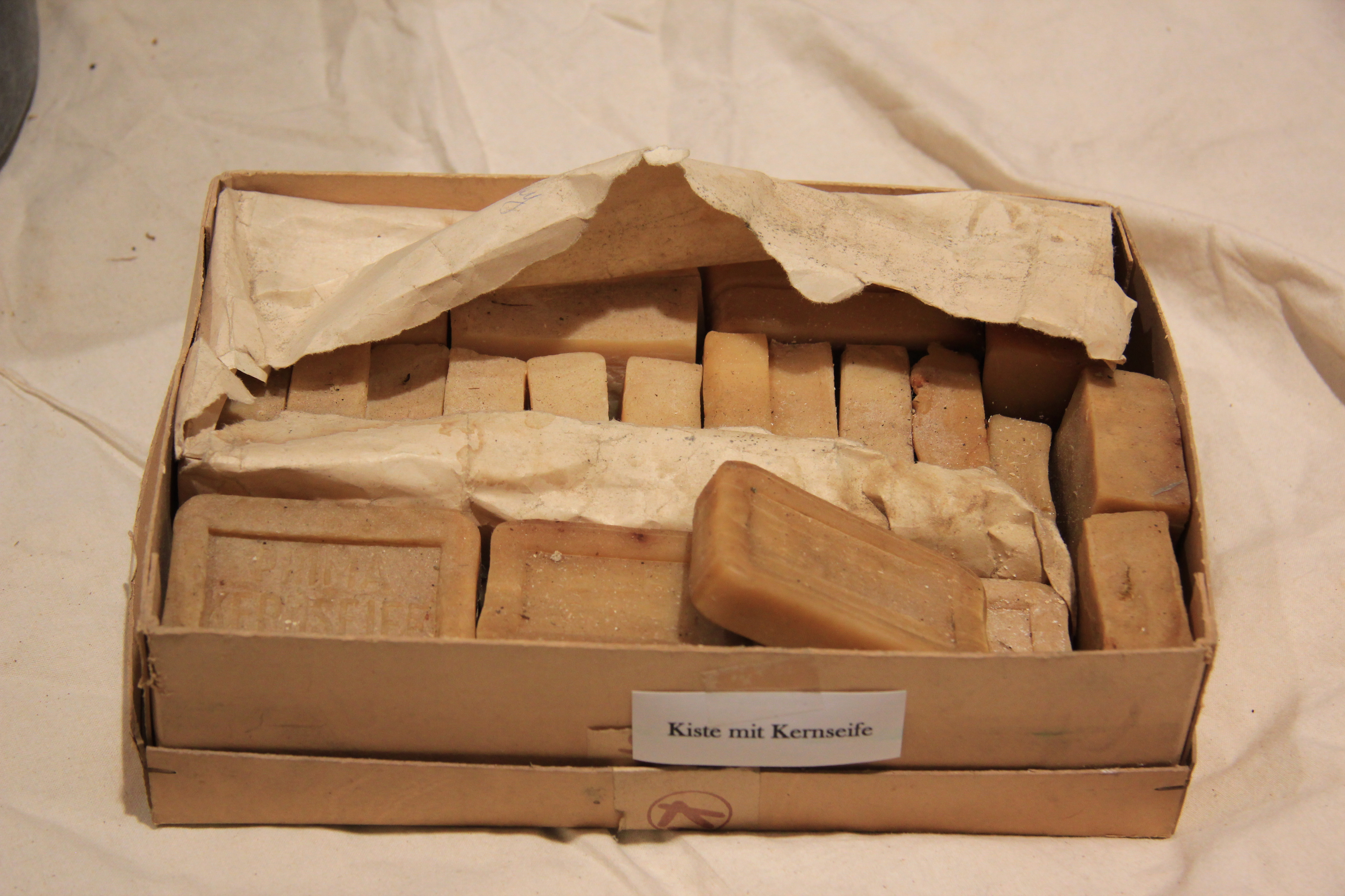 Ausstellungsstück(e) bei der Ausstellung „Die Region um 1914“ in der Stadtgalerie Mödling